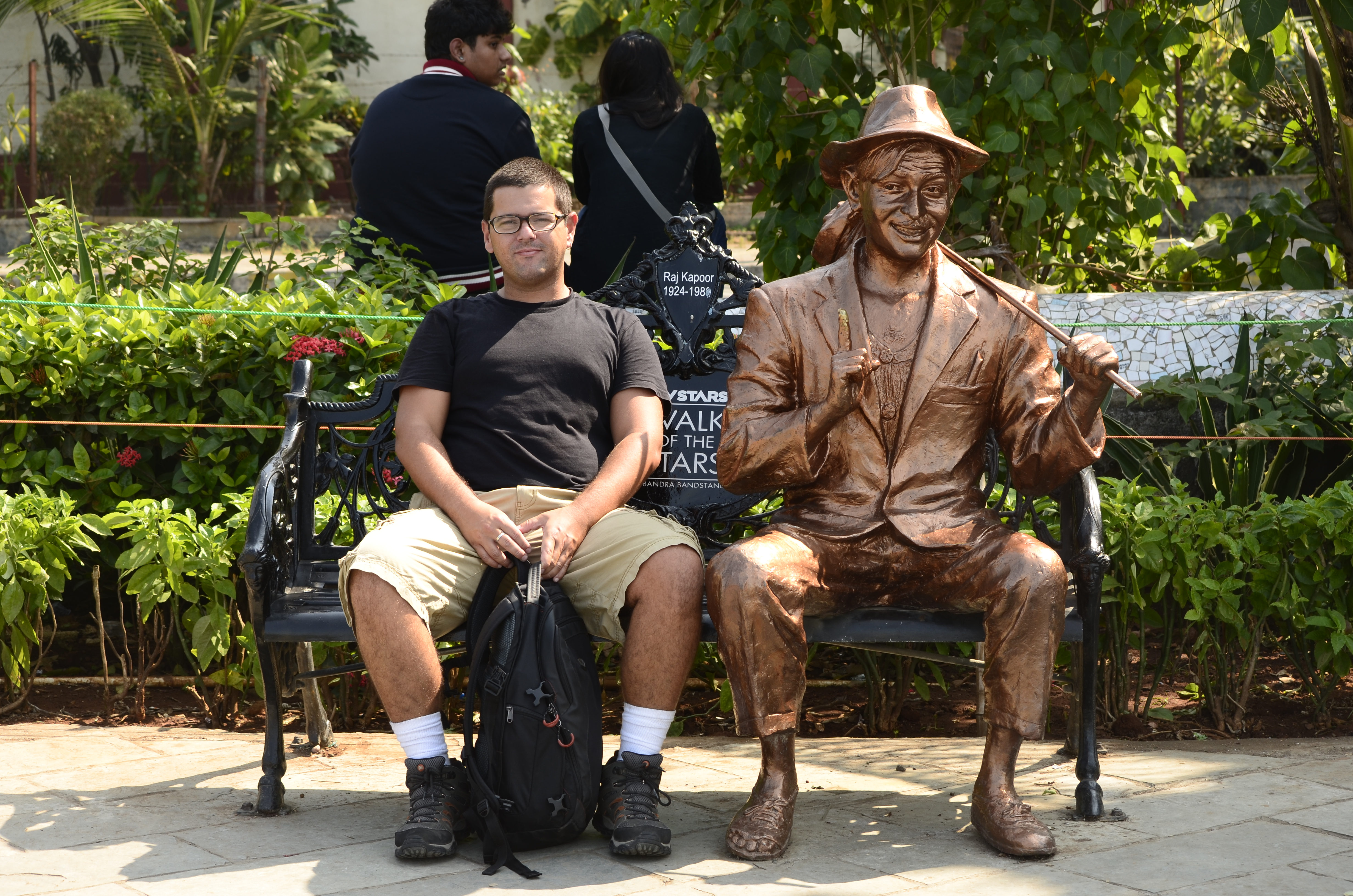 Na calçada das estrelas de Bollywood.